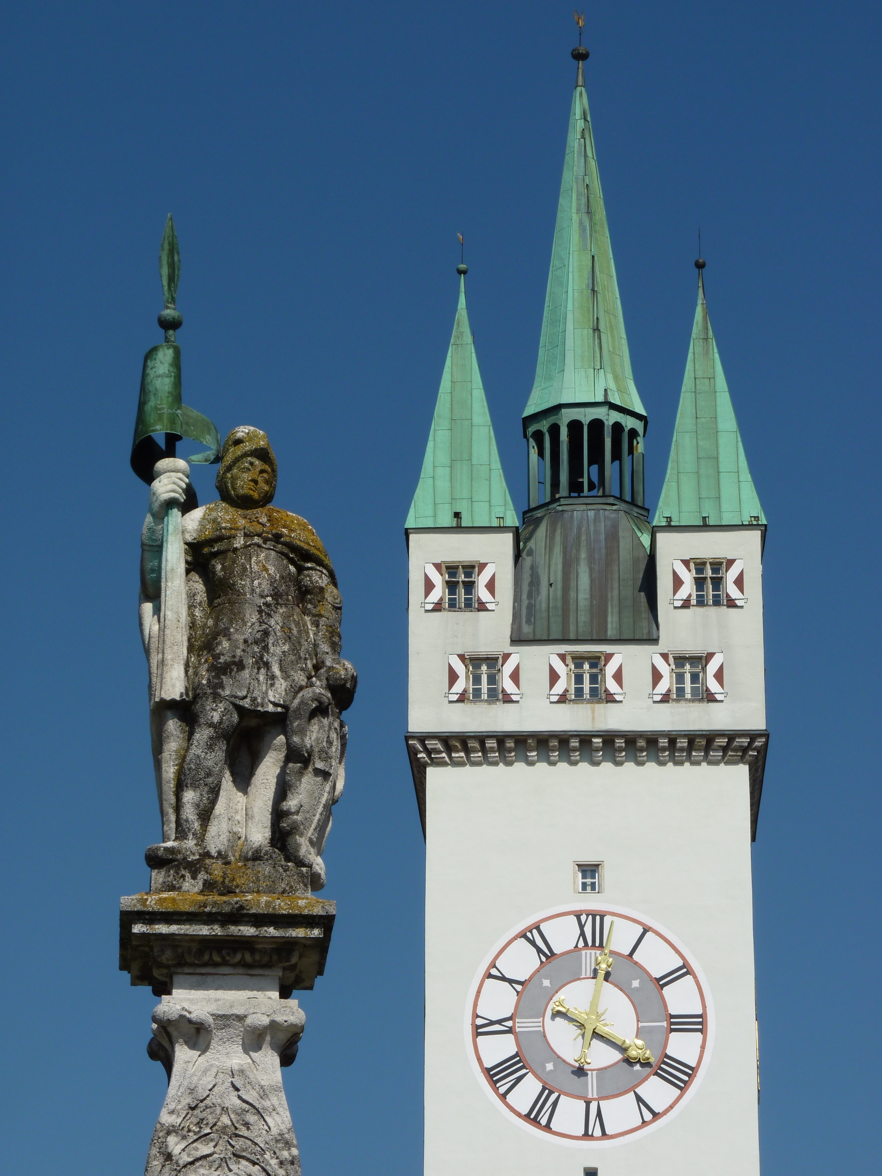 Stadttum von Straubing und Tiburtiusbrunnen vom Theresienplatz gesehen